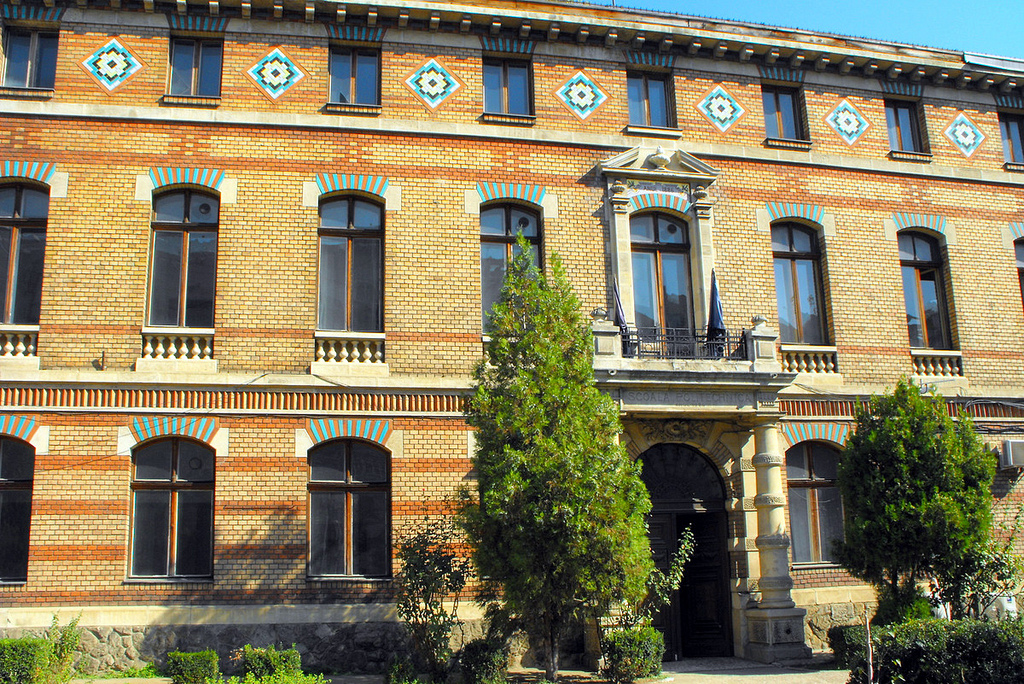 Institutul Politehnic, fatada principala